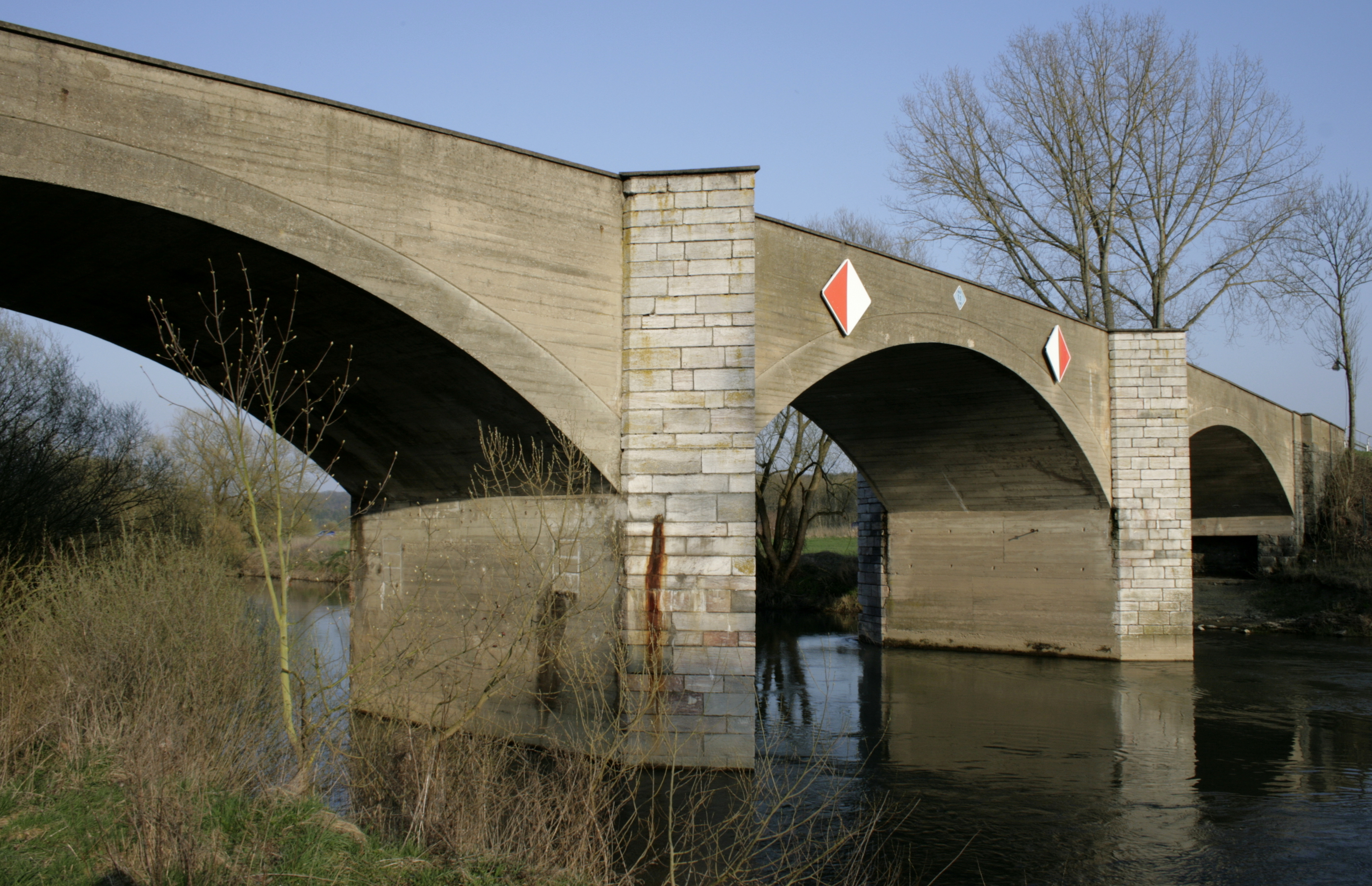 Lahnbrücke in Dehrn, Deutschland